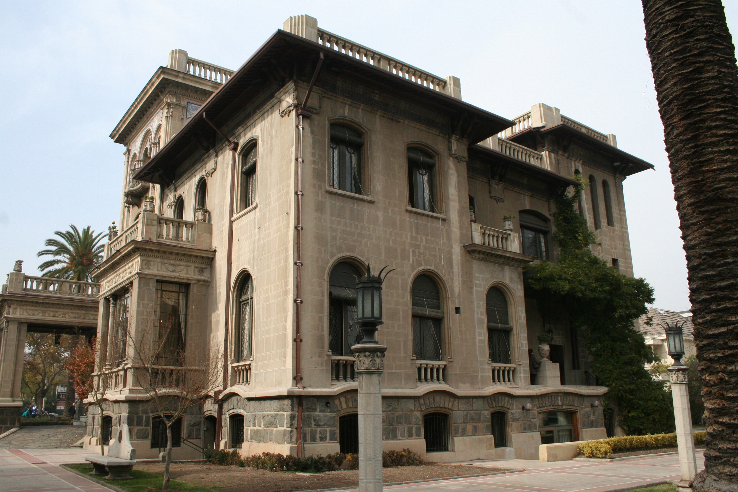 Fachada Palacio Falabella visto del patio posterior